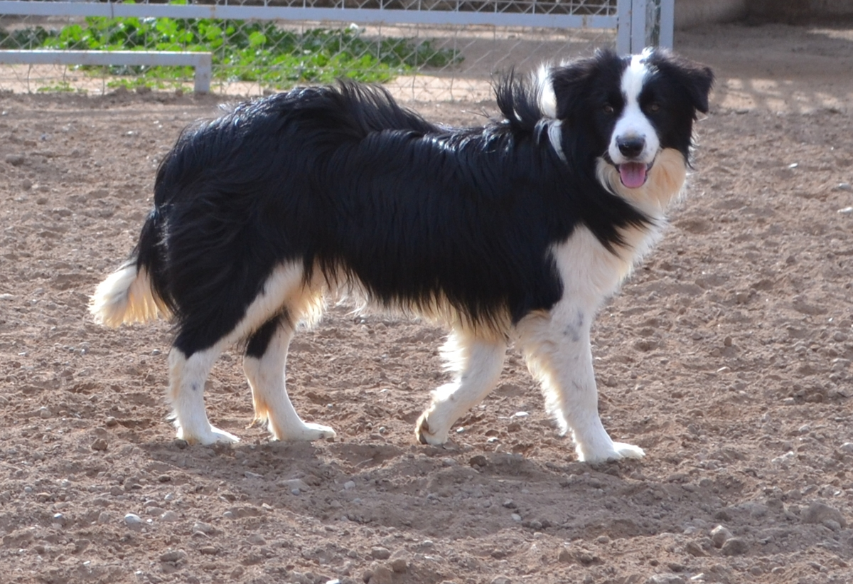 Border Collie Macho Blanco y Negro